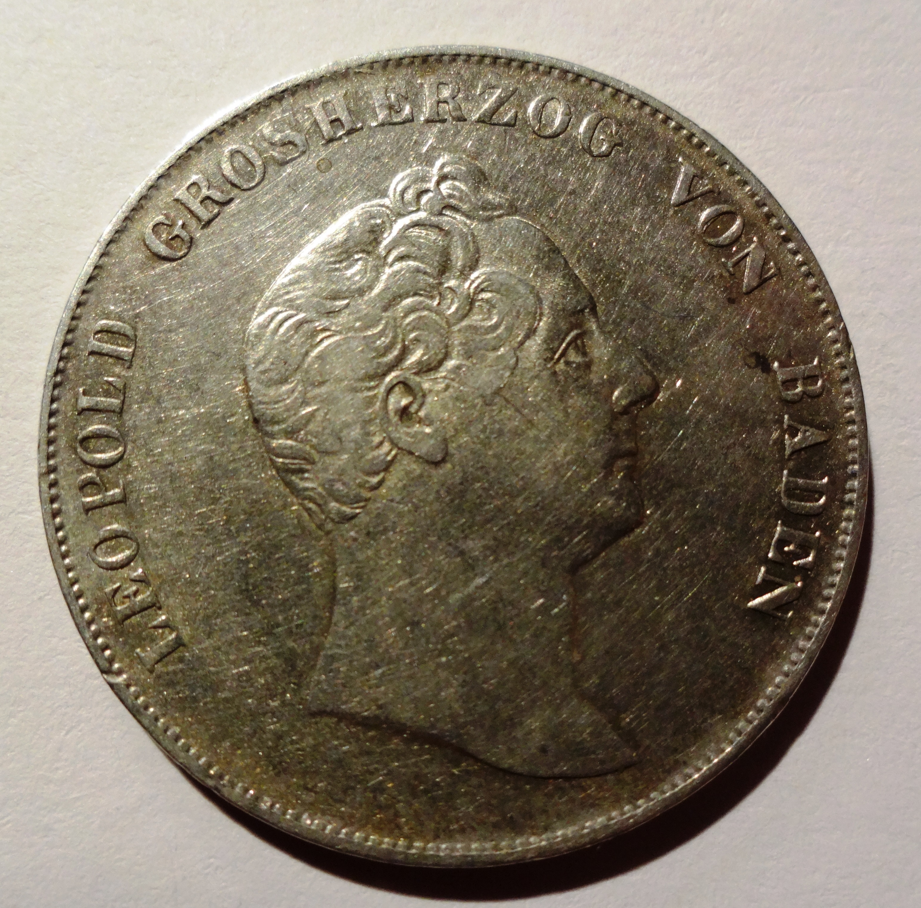 Leopold v. Baden auf Gulden, Jahr 1839